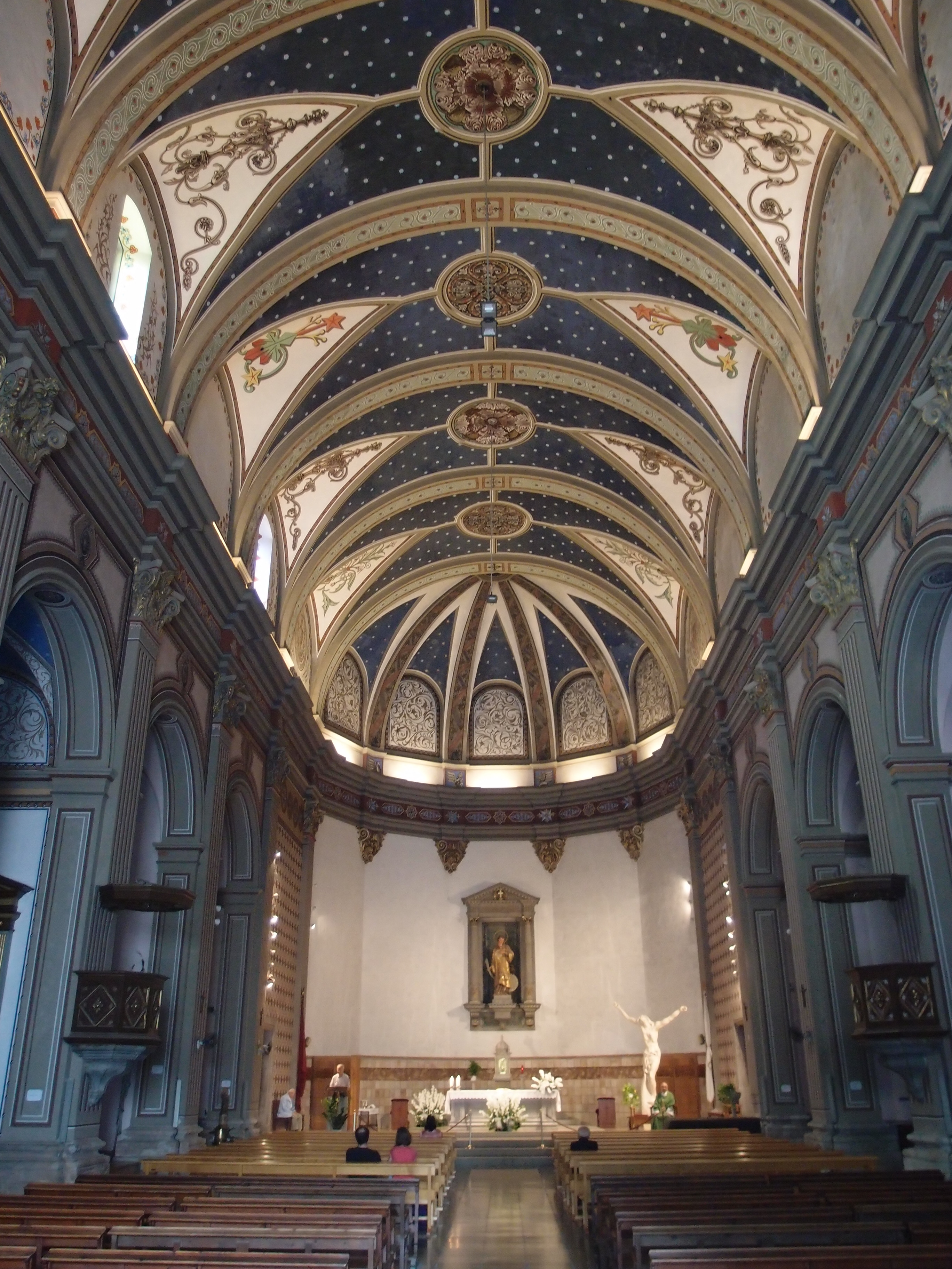 Església de Sant Vicenç - Mittelschiff (Tossa de Mar/Katalonien/Spanien) Datum: 18.09.2012 Urheber: M. Pfeiffer alias Benutzer:Gordito1869 Quelle: privates Fotoarchiv des Urhebers